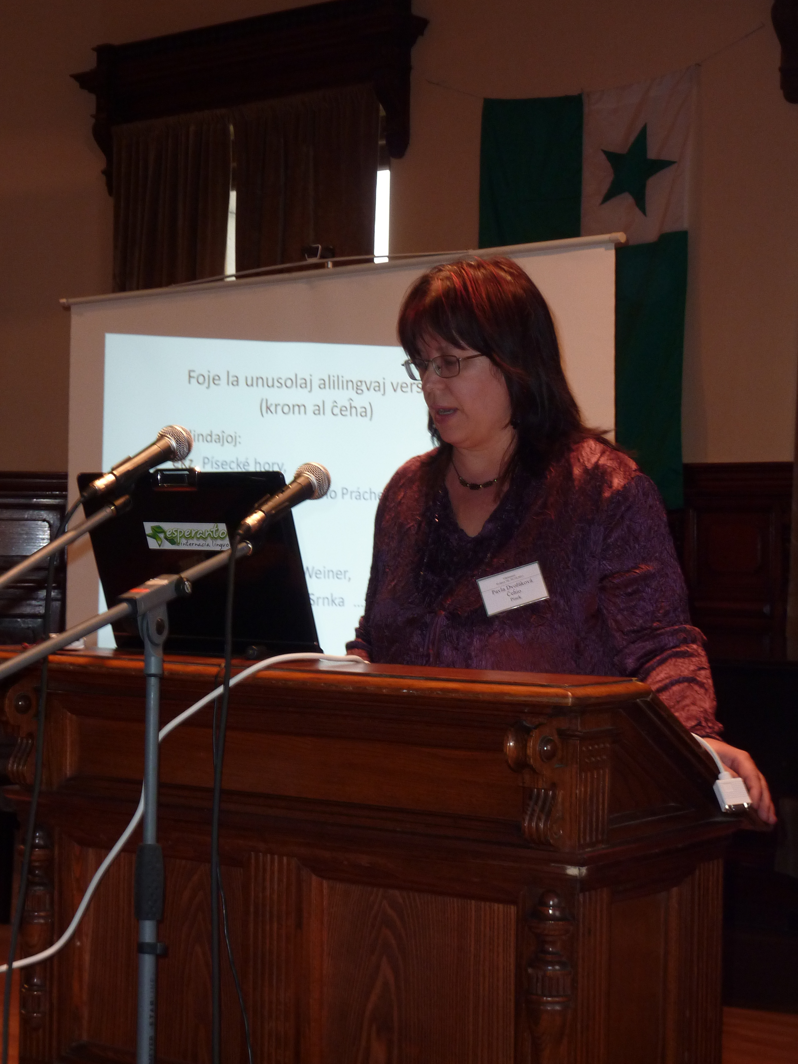 Pavla Dvořáková dum Esperanta Vikimanio 2011 en Svitavy.